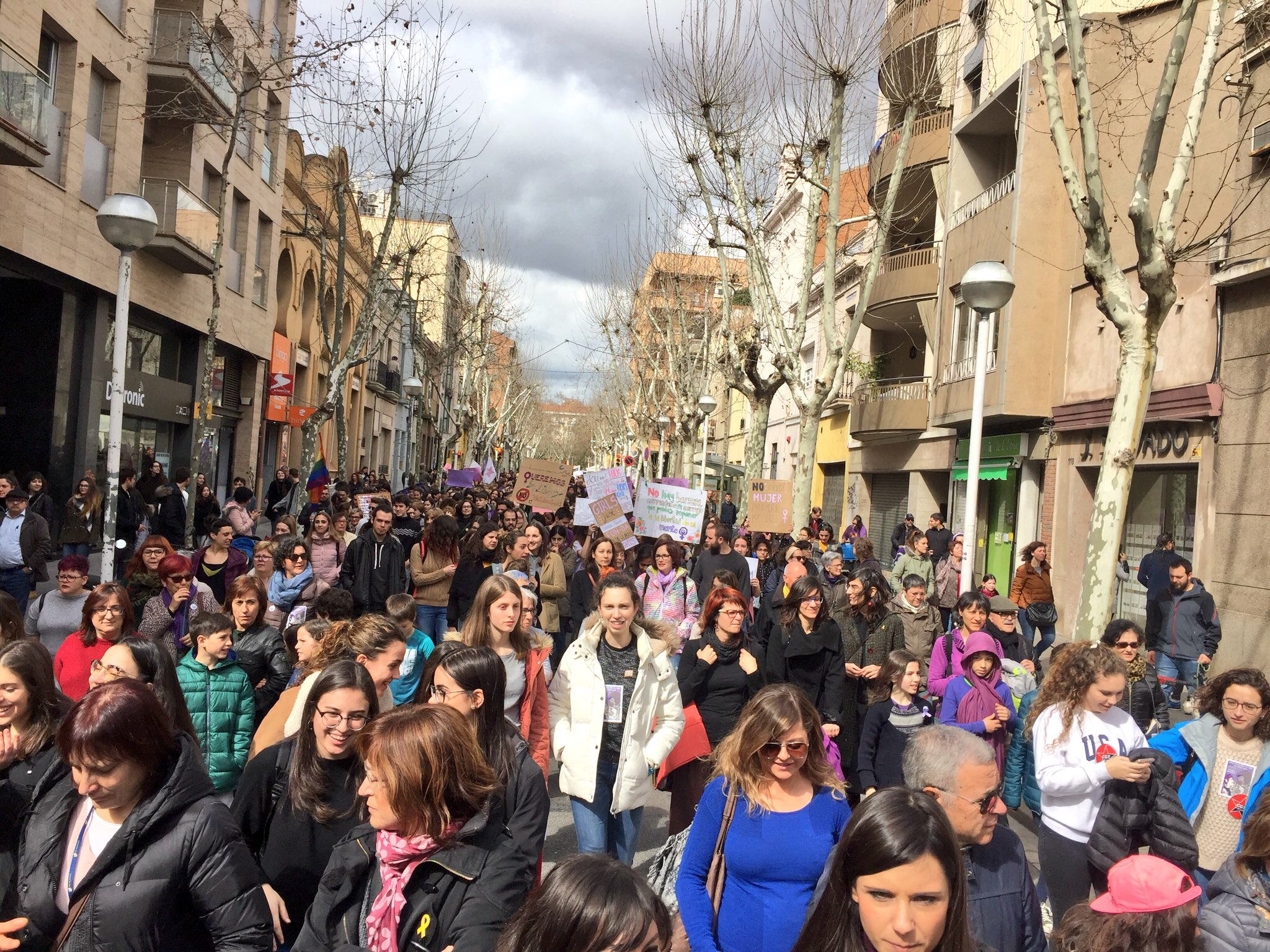 Vaga feminista 8M 2018 a Sabadell